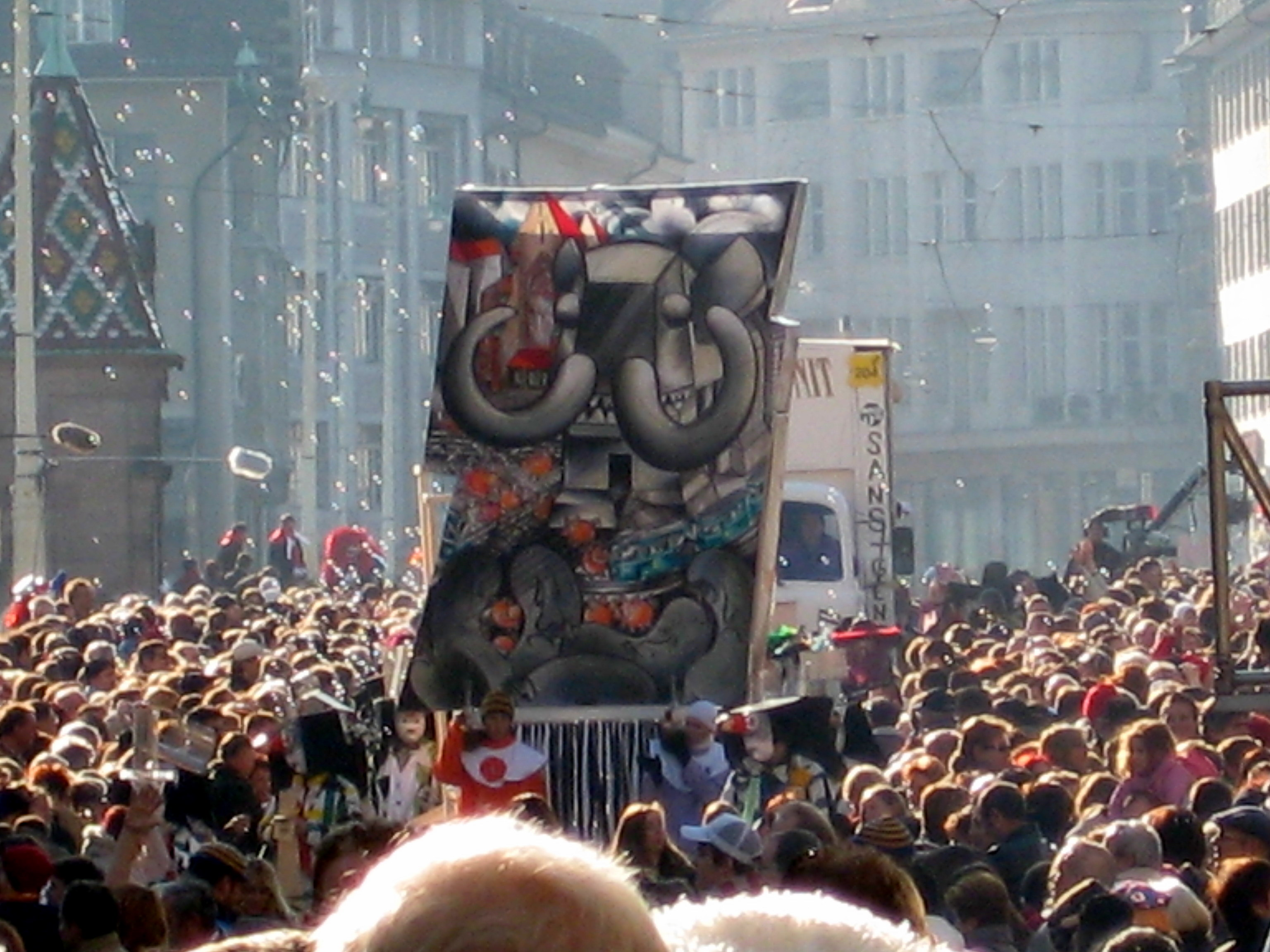 Cortege